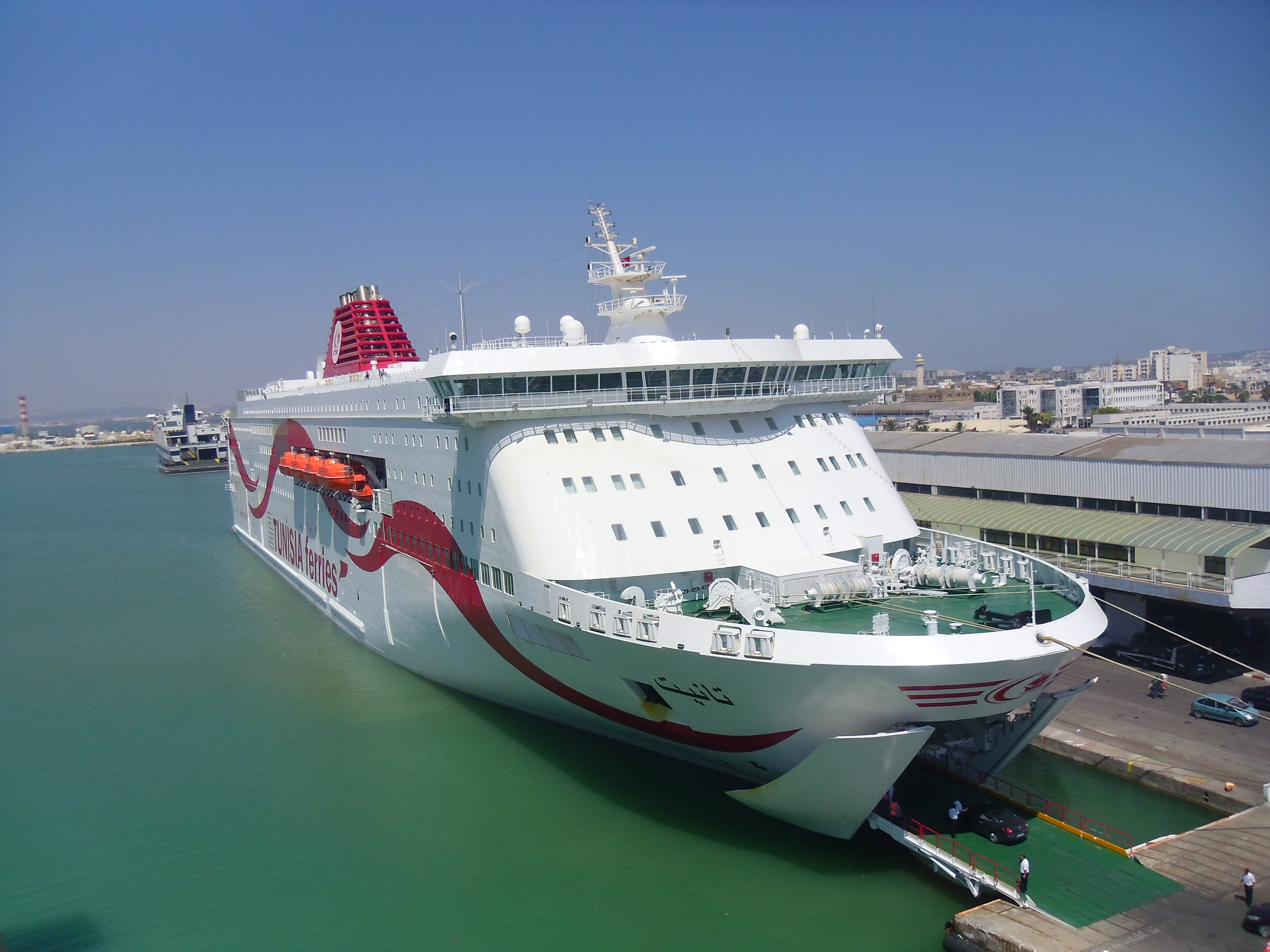 Le bateau Tanit amarré au port de Goulette en Tunisie